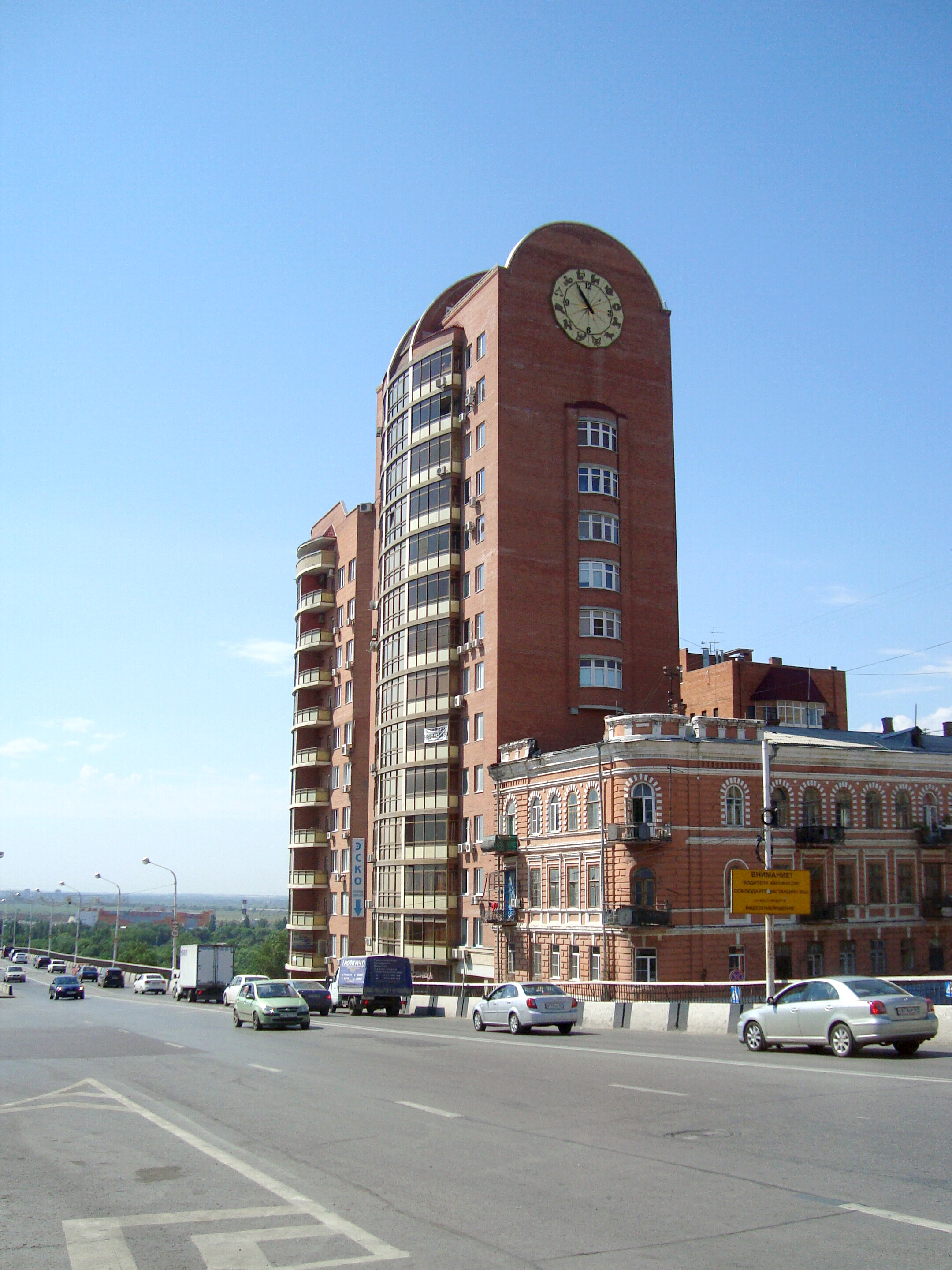 Ростов-на-Дону. Ворошиловский проспект